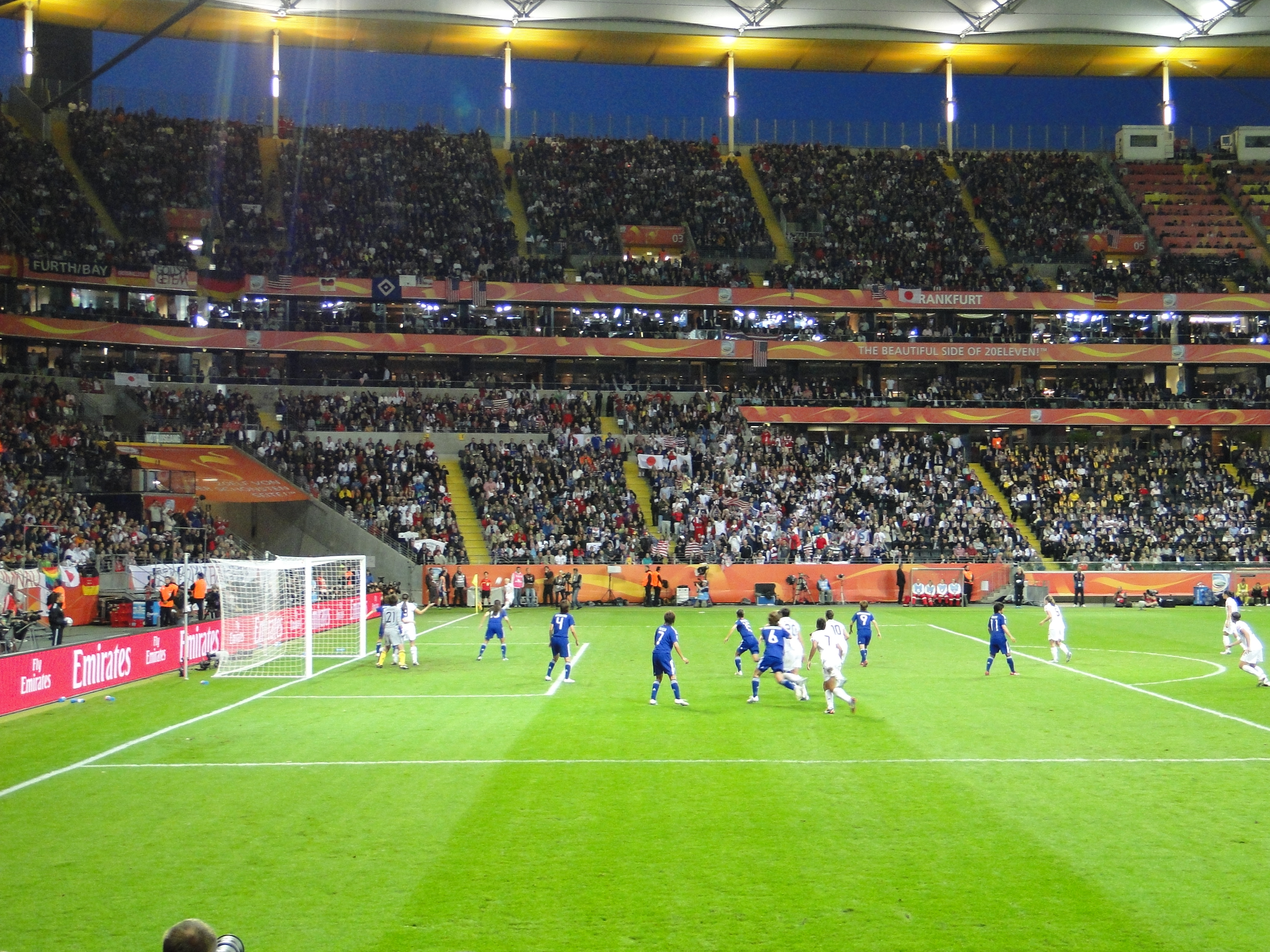 Corner kick. Japan defends, USA attacks.